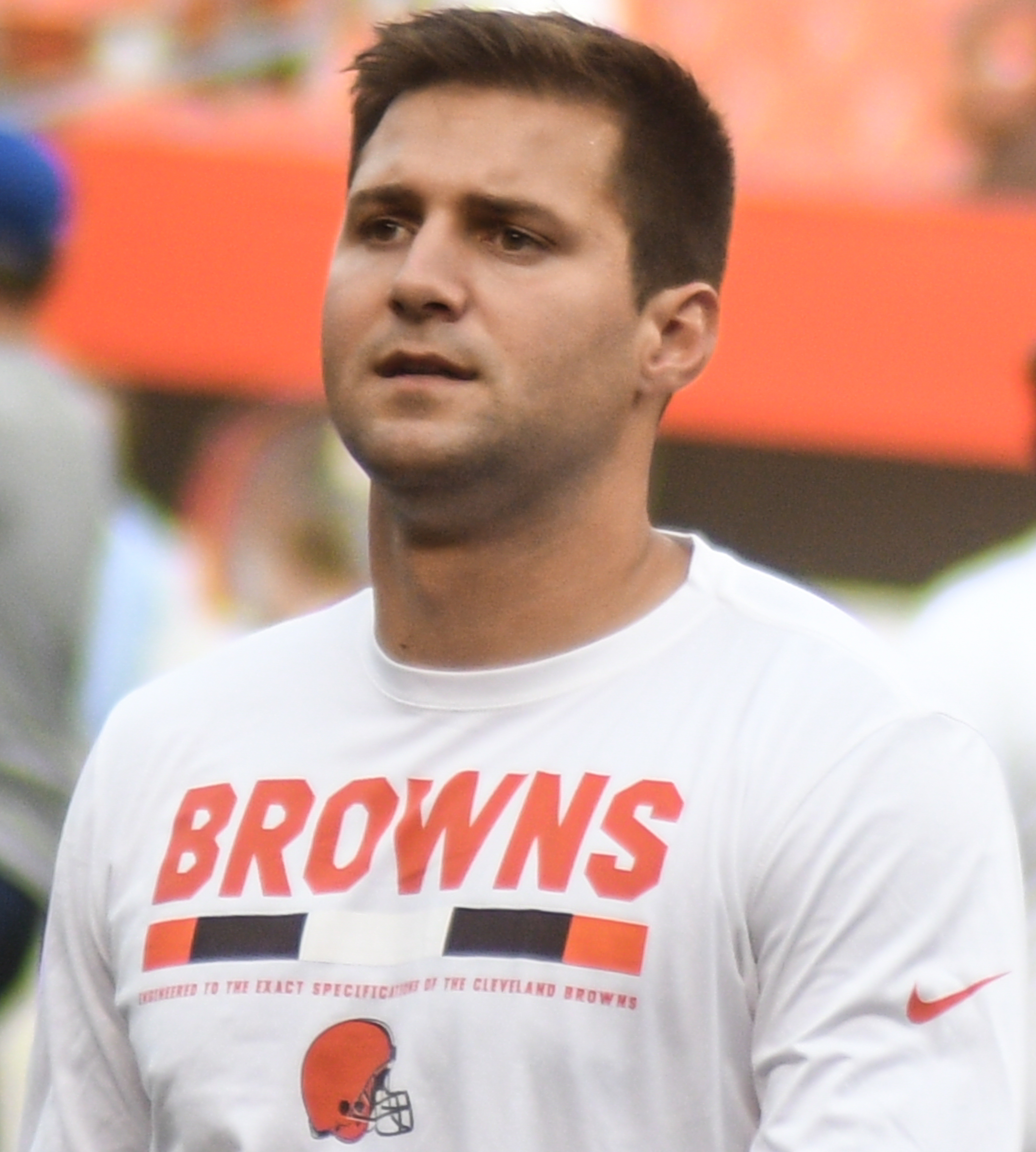 Cody Kessler